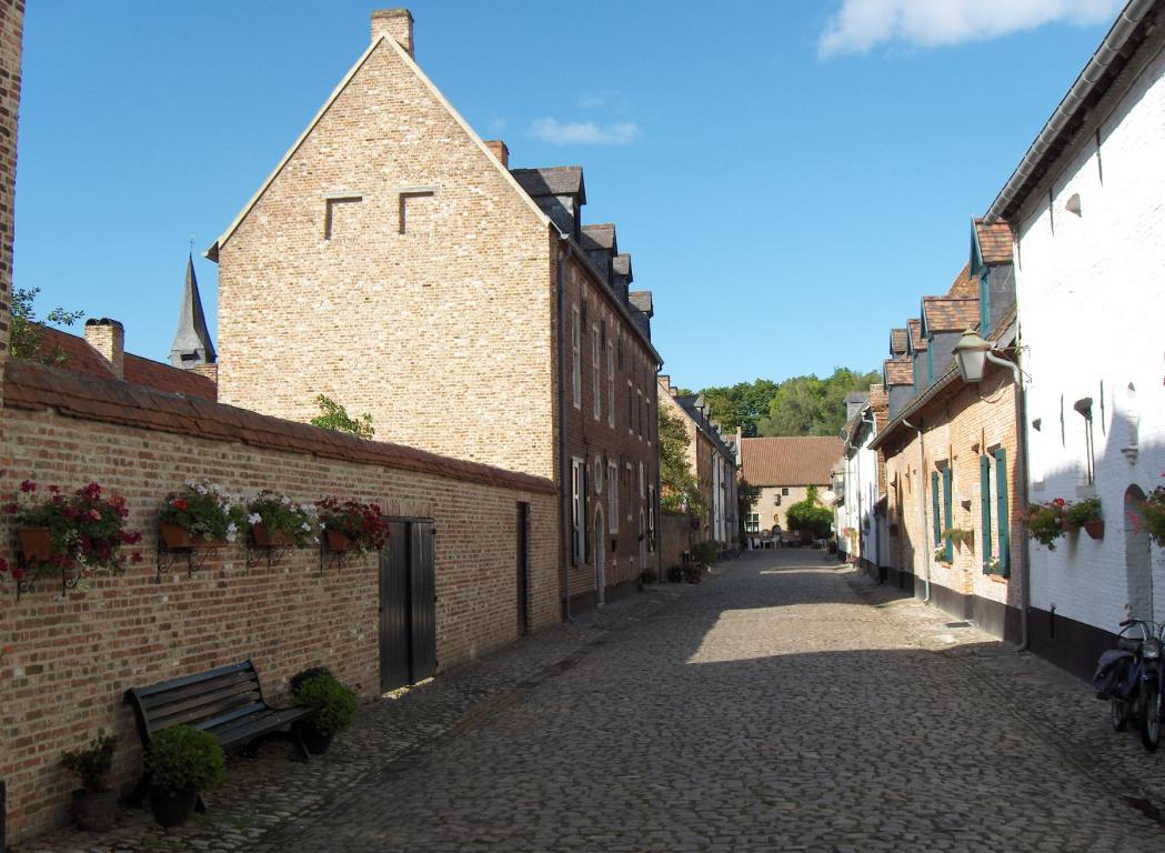 Straat in het Begijnhof van Diest.